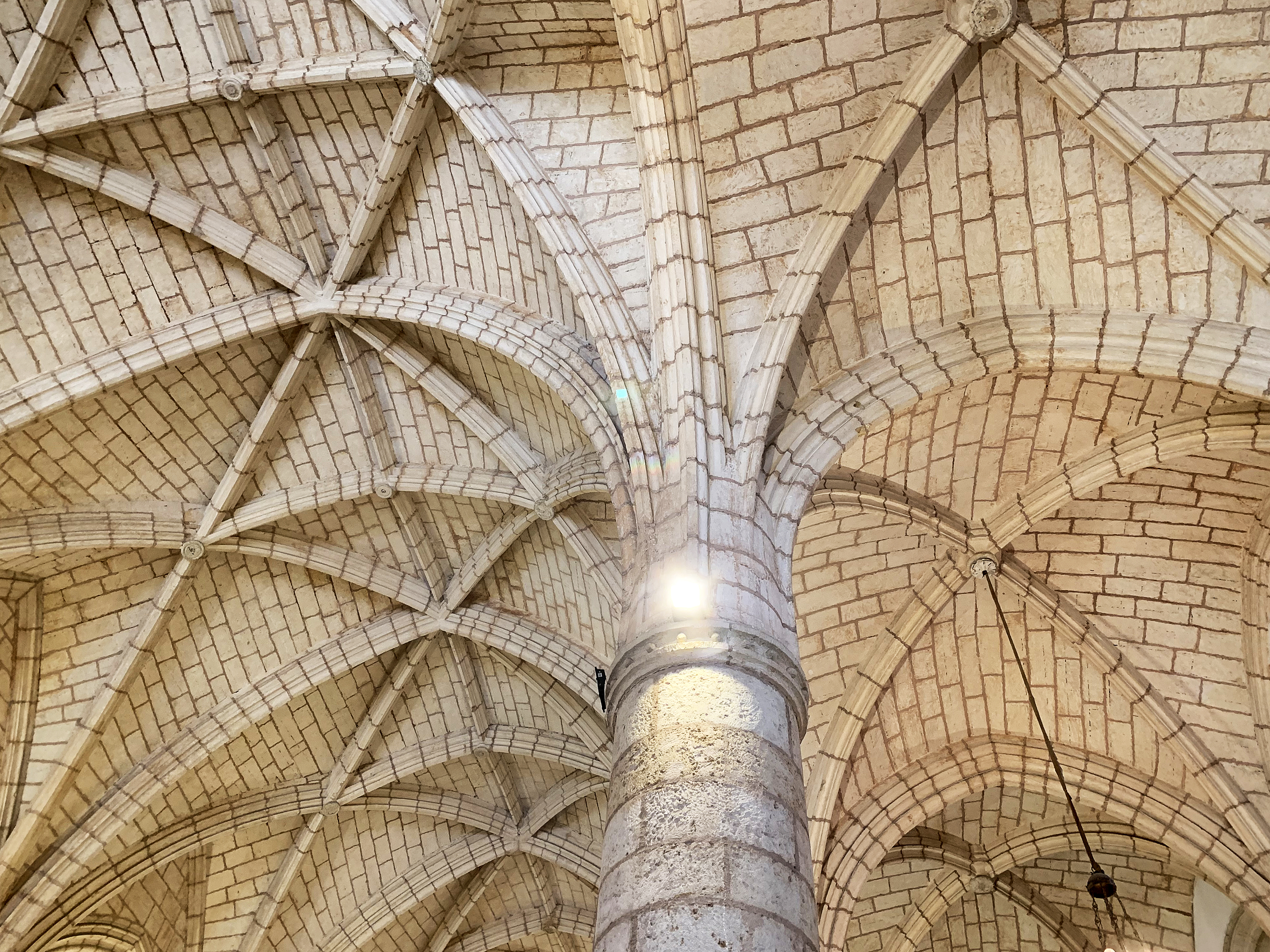 Columna y bóvedas de crucería o nervadas de la Basílica Catedral Menor de Santa María (Catedral Primada de América), Santo Domingo, República Dominicana.